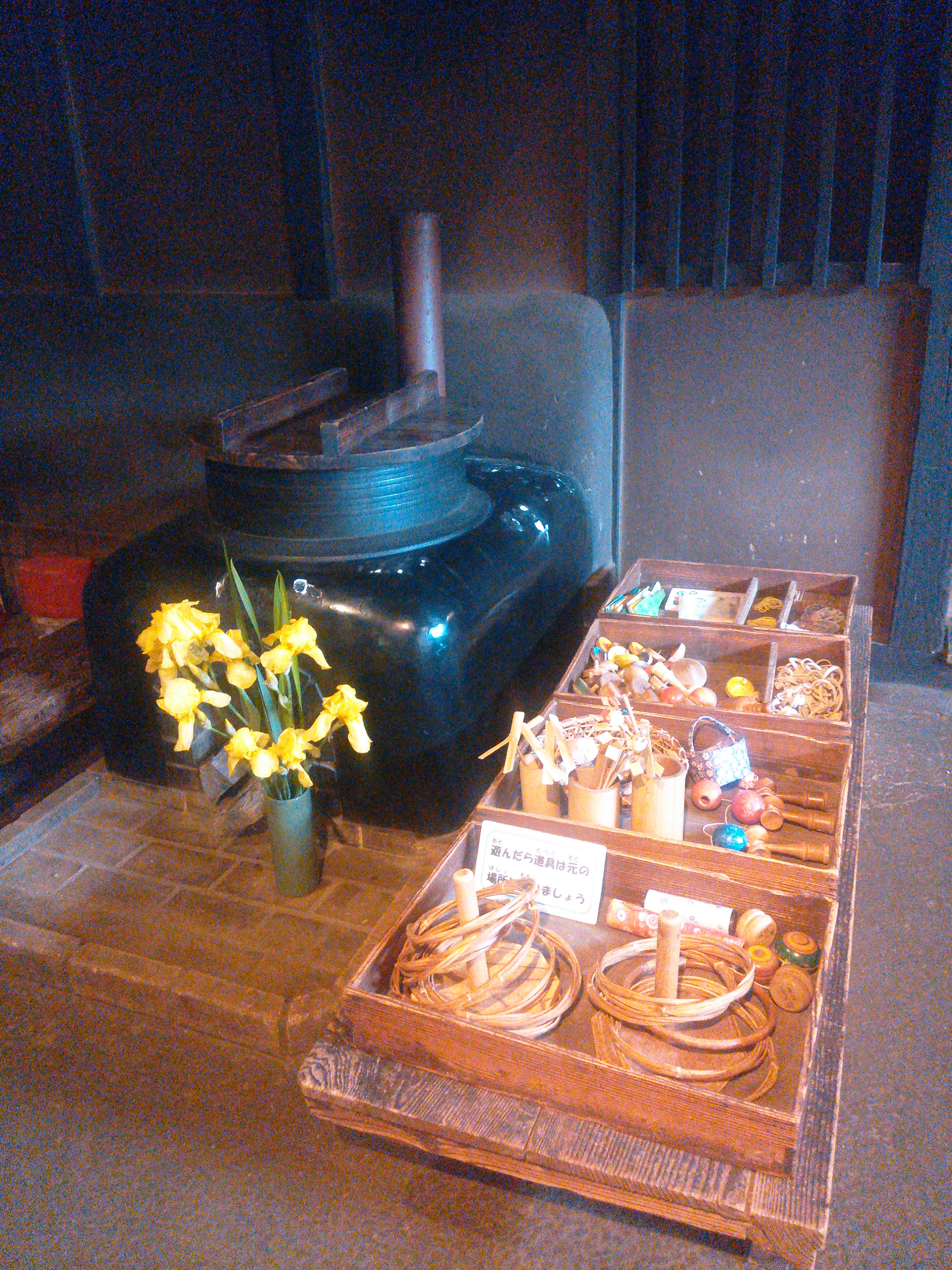 さいたま市見沼区、旧坂東家住宅見沼くらしっく館に展示されている郷土玩具